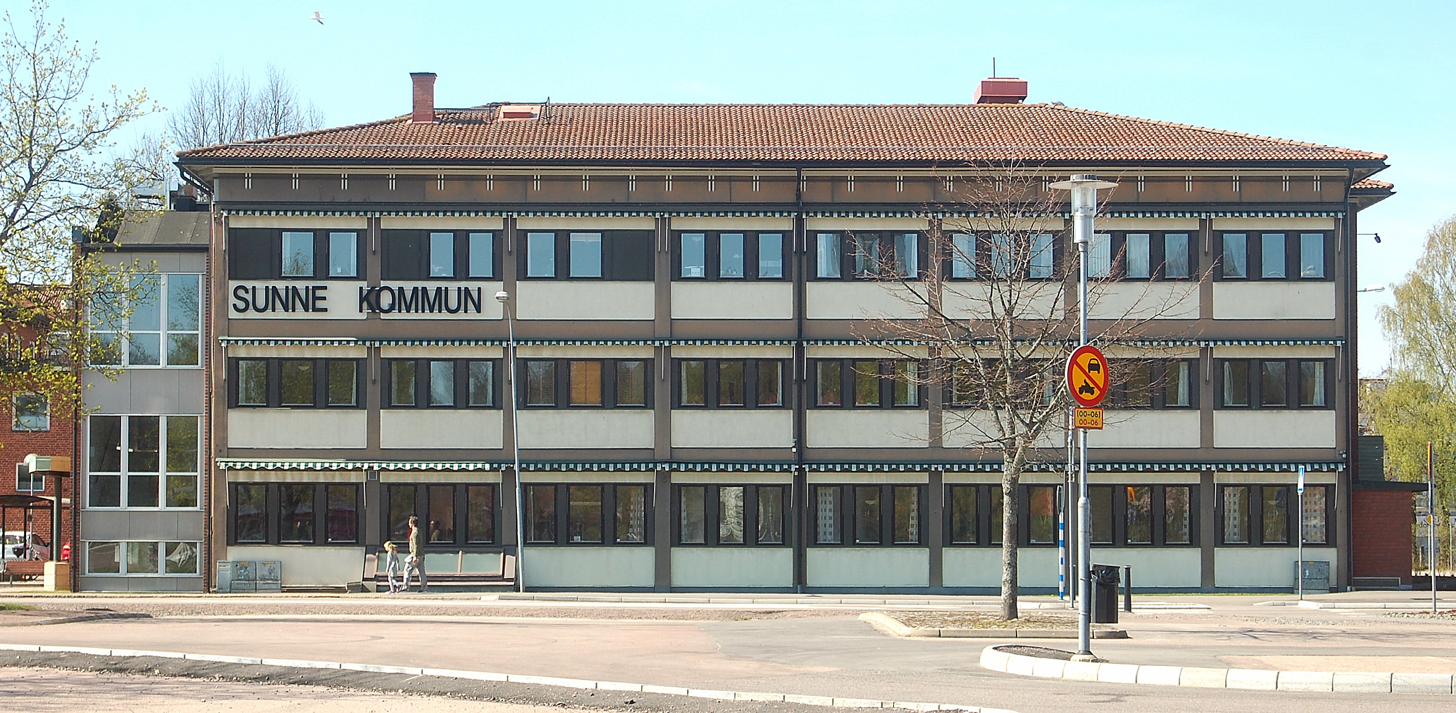 Komunhuset Sunne.